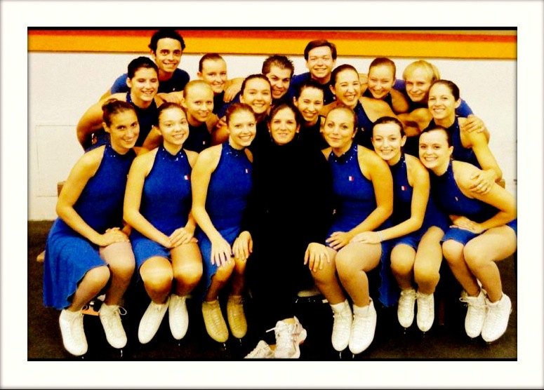 Les Atlantides, practice septembre 2012 Bordeaux France